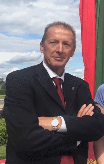 Portrait anlässliche der OSZE Jahrestagung in Belarus - Minsk.